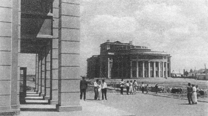 Imagine din oraşul Tiraspol